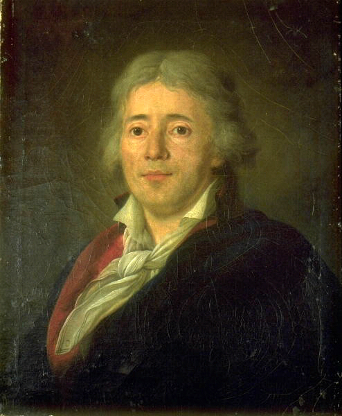 Pierre Lacour - Louis Combes (architecte) circa 1810